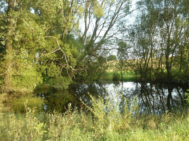 Staw w Kaliskach